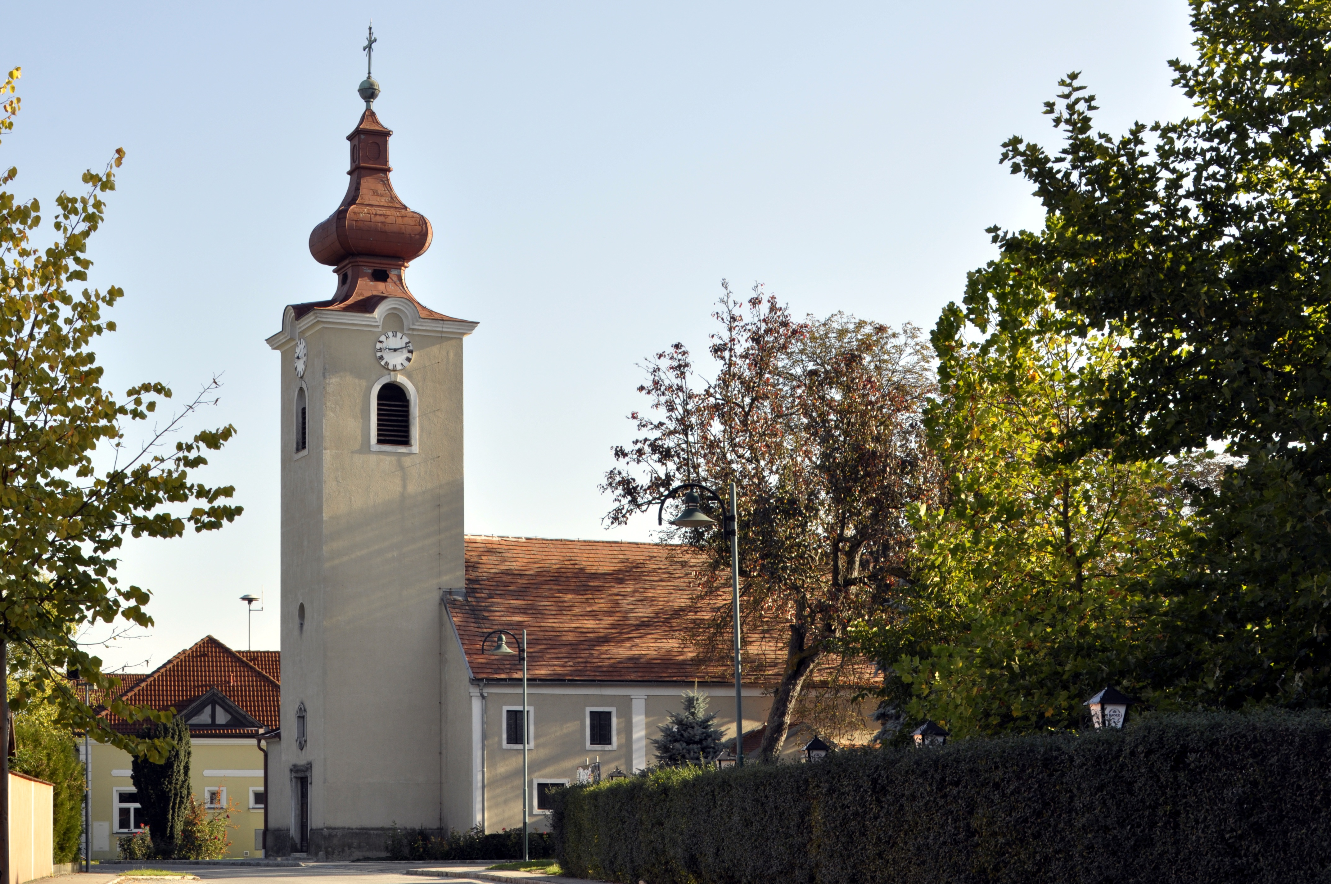 Kath. Pfarrkirche hl. Laurentius